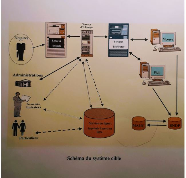 Issue d'une publication interne de l'Association Mutuelle des Conservateurs de 2005, cette image représente le schéma des liaisons entre tous les opérateurs et les clients du service des hypothèques après dématérialisation des échanges avec les Notaires. Membre du bureau de l' AMC , j'ai pouvoir de placer cette image sous licence Créative Commons